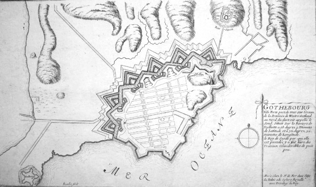 Kopparstick från ca. 1705 av staden Göteborg. Texten lyder: Gothebourg. Ville forte port de mer sur l'Ocean de la province de Westro-Gotland au nord du destroit appellé le sond. Située la Riviere de Trolhette a 58 degrez, 5 minutes de Latitude et a 32 degrez, 50 minutes de Longitude. le Roy de Suede par qui elle est passedée y a fait faire des Travaux considerables de puis peu. Paris chez le S de Fer dans l'Ifle da Palais a la Sphere Royalle avec Privilege du Roy.